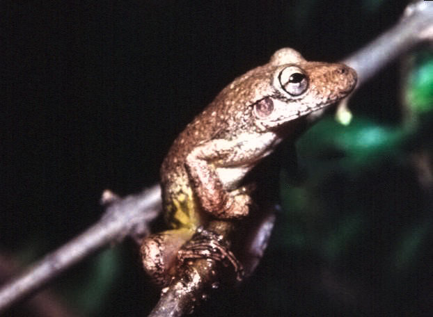 Scinax hayii